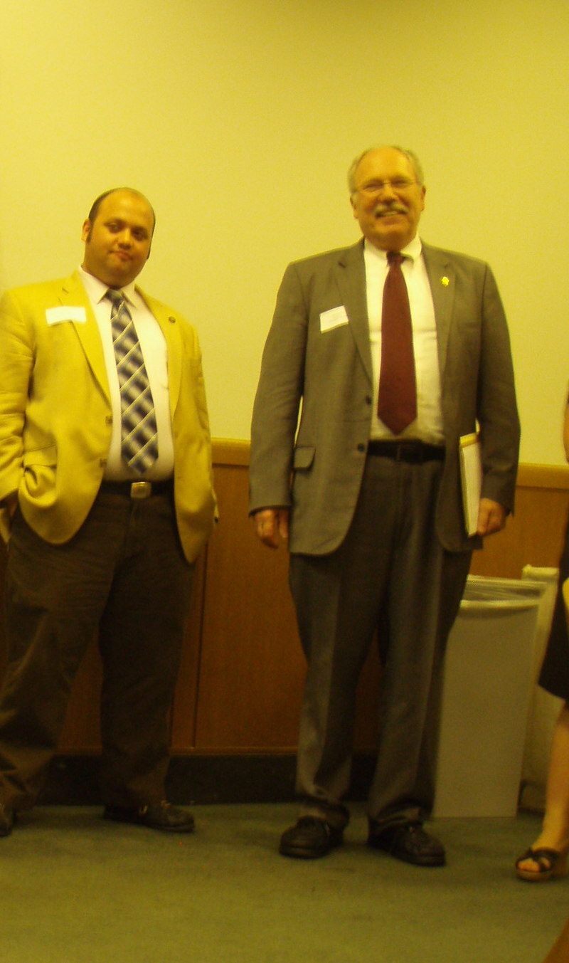 Oregon legislators Nick Kahl (left) and Arnie Roblan